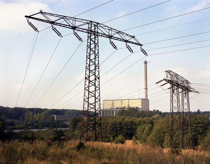 Potsdam: VE Kombinat Kernkraftwerke "Bruno Leuschner" Greifswald/ Betriebsteil KKW Rheinsberg. Im Vordergrund ist die Freiluftschaltanlage, im Hintergrund das Hauptgebäude des Kernkraftwerkes zu sehen. (ADN-Junge) Information added by Wikimedia users.